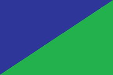 Bandera del municipio